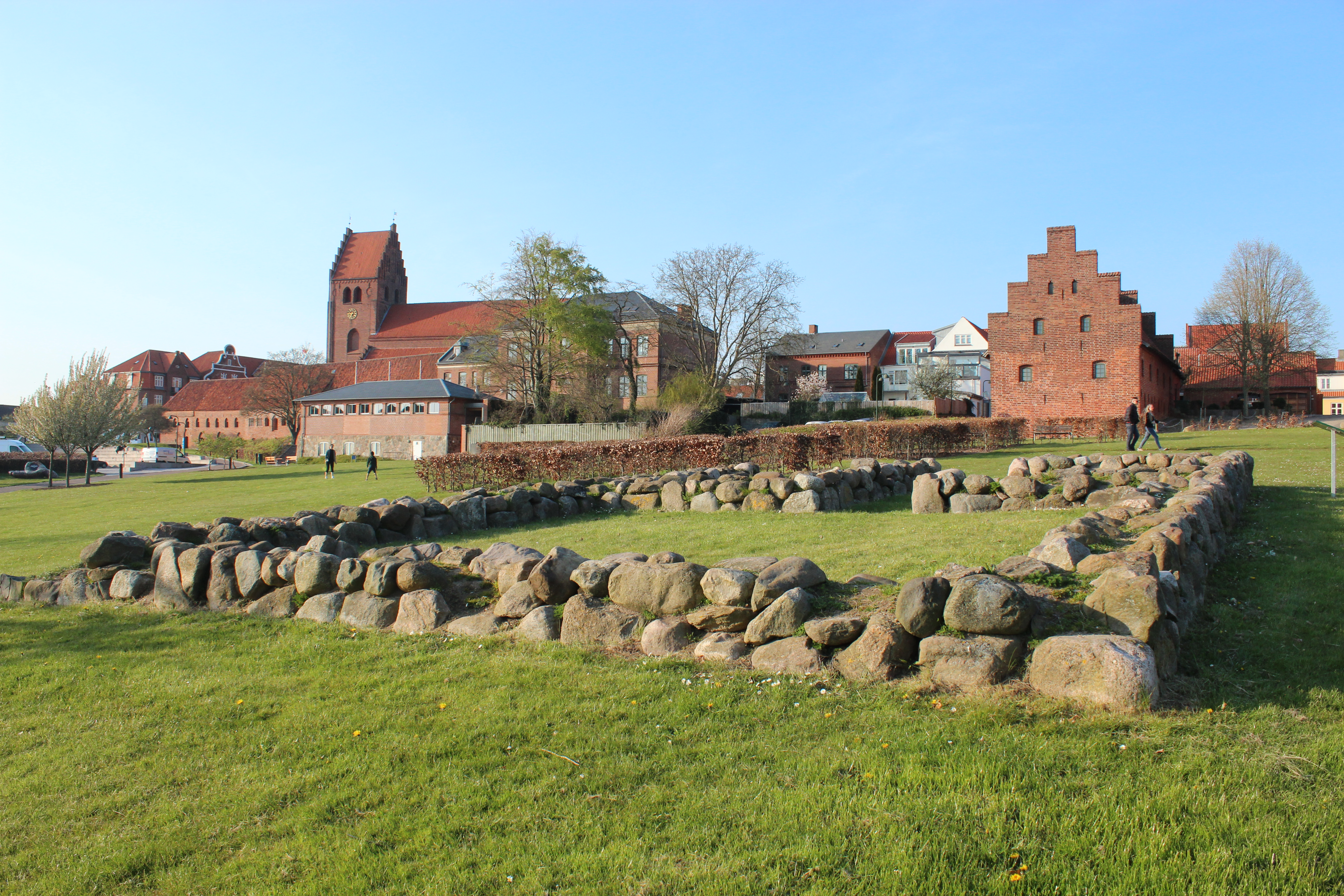 Ruiner af Tuesens Badstue i Næstved. I baggrunden ses tårnet fra Sankt Peders Kirke, Boderne og Kompagnihuset.